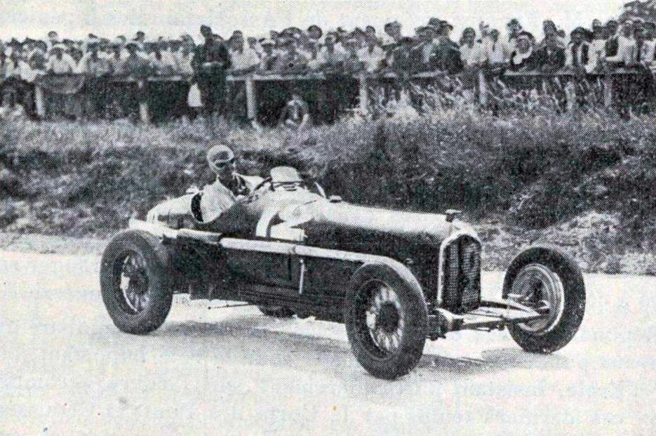 Louis Chiron, vainqueur du Grand Prix de l'A.C.F. 1934 sur Alfa Romeo.